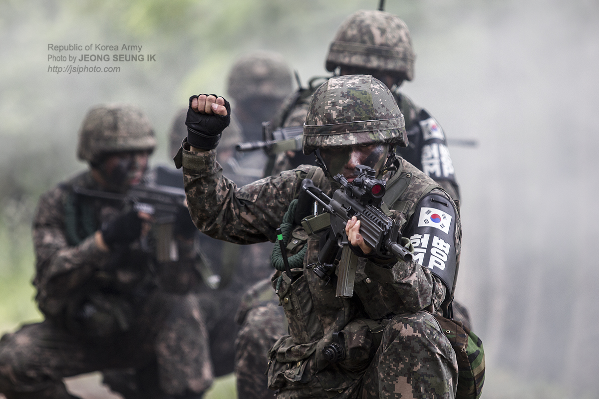 육군 3사단 DMZ 수색정찰 / 촬영 : 정승익 \